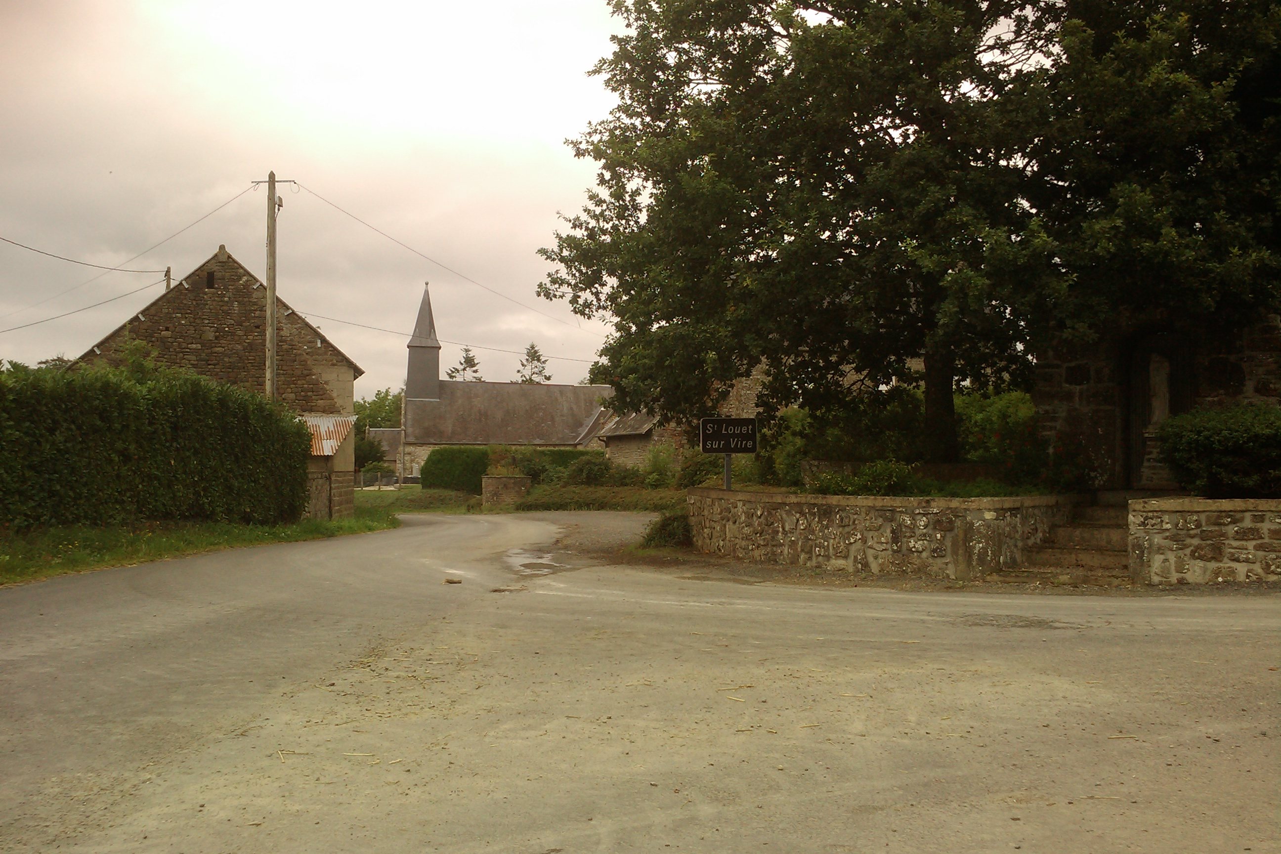 vue de la commune Saint-Louet-sur-Vire avec église et son autel à la vierge